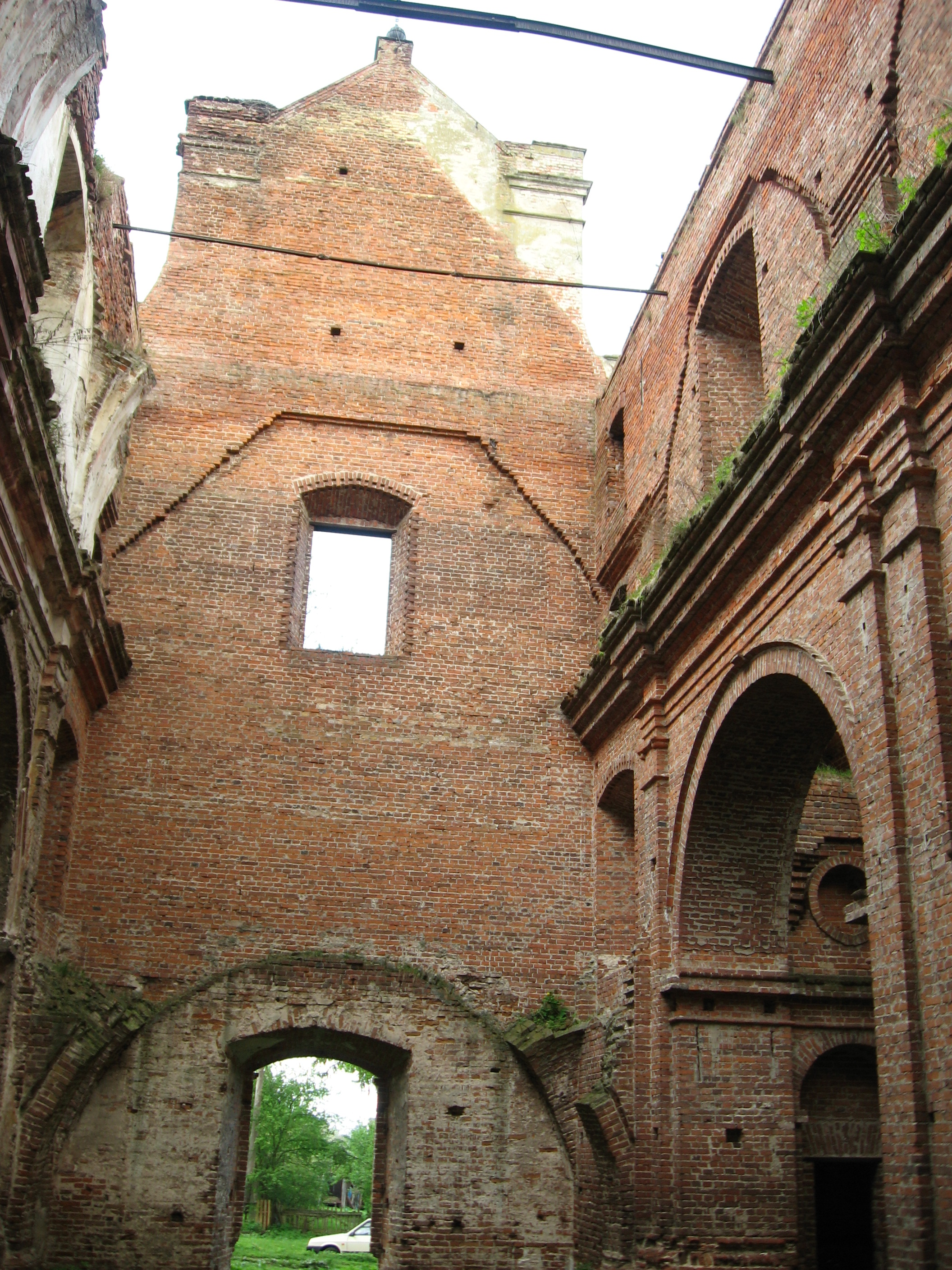 Кисилин. Інтер'єр зруйнованого костелу